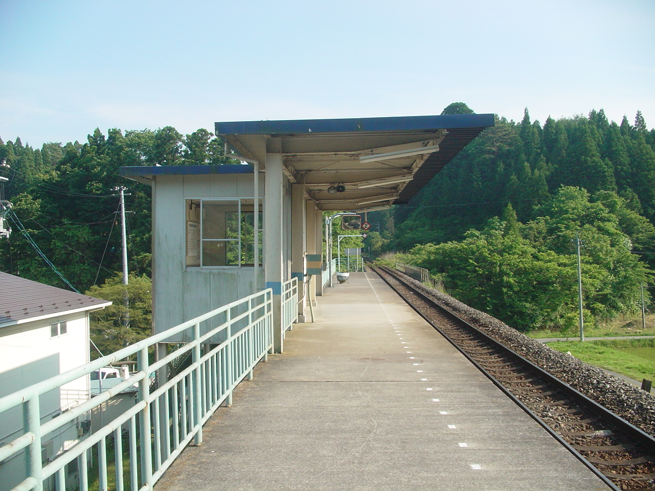 （陸前港駅）